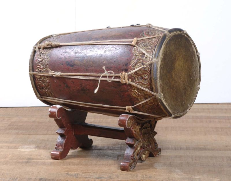 Slaginstrument. Het houtsnijwerk (ukiram) van de onderstellen is gemaakt in de beroemde Djajadipuram volgens aanwijzingen van het toenmalige hoofd. De versieringsmotieven vertonen een melange van 19e eeuwse Biedermeyermotieven (de plantenbak op de gender, de barung en de gambang, het bladermotief) en authentieke Javaanse ornamenten. De gamelan is afkomstig uit de kapatihan van Jogjakarta, waar deze in de tweede helft van de negentiende eeuw werd vervaardigd in opdracht van de regerende patih (eerste minister van het sultanaat Ngajogyaningrat), prins G.P.H. Hadiloesoemo. Deze gamelan werd als losse slendro-gamelan voor het privégebruik van deze patih gebouwd. Er hoort naar alle waarschijnlijkheid geen pelog-helft bij. Er zijn meer gevallen bekend van dergelijke slendro-gamelans uit de Jogja'se kapatihan. De slenthems maakten oorspronkelijk geen deel uit van deze gamelan, evenmin als de onversierde gender barung, die qua klank gewoon een overbodige verdubbeling is van de wél versierde gender barung. . Dubbelvellige tonvormige trom, onderdeel van gamelan Slendro